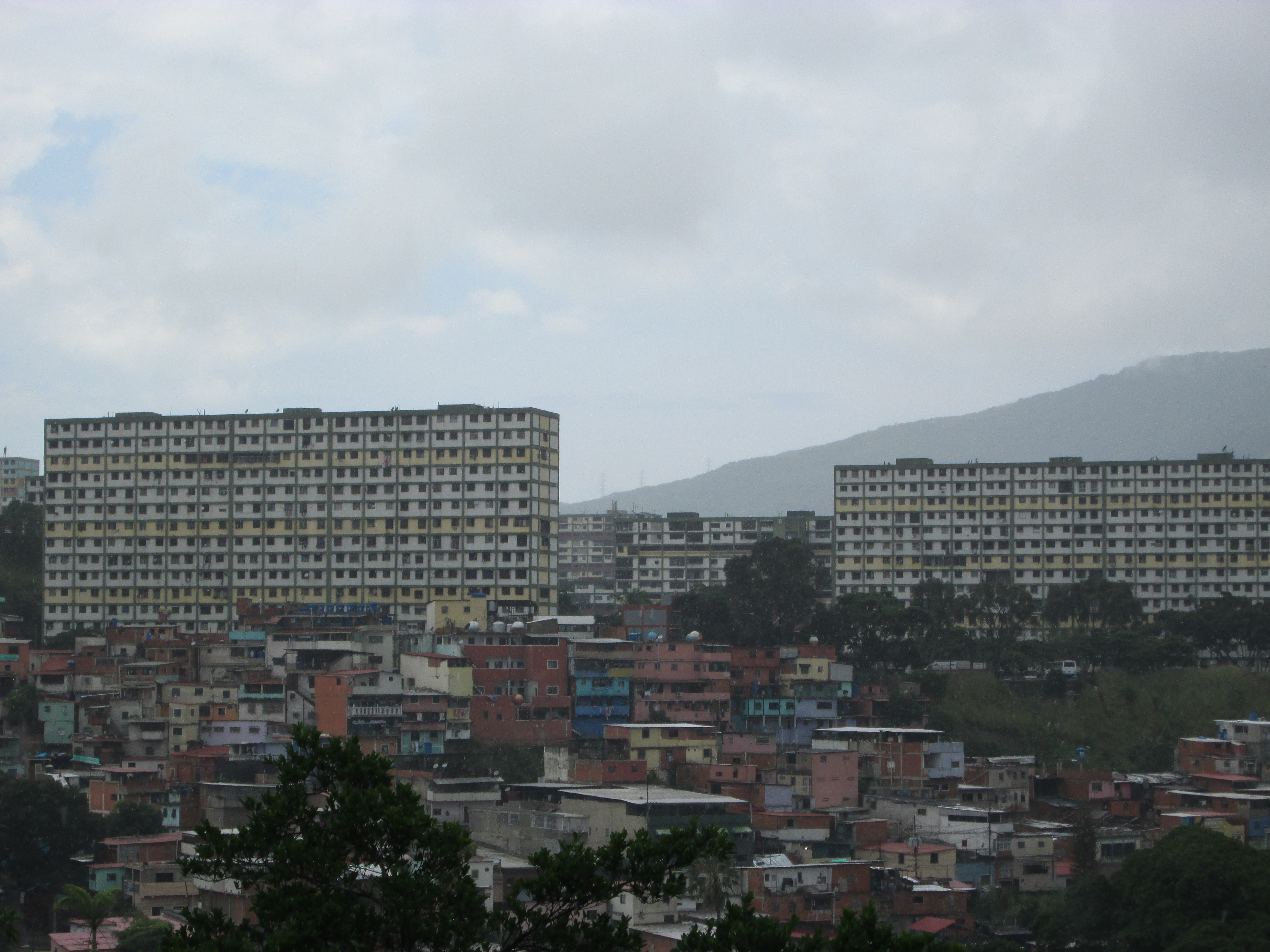 Vista de Bloques del 23 de Enero